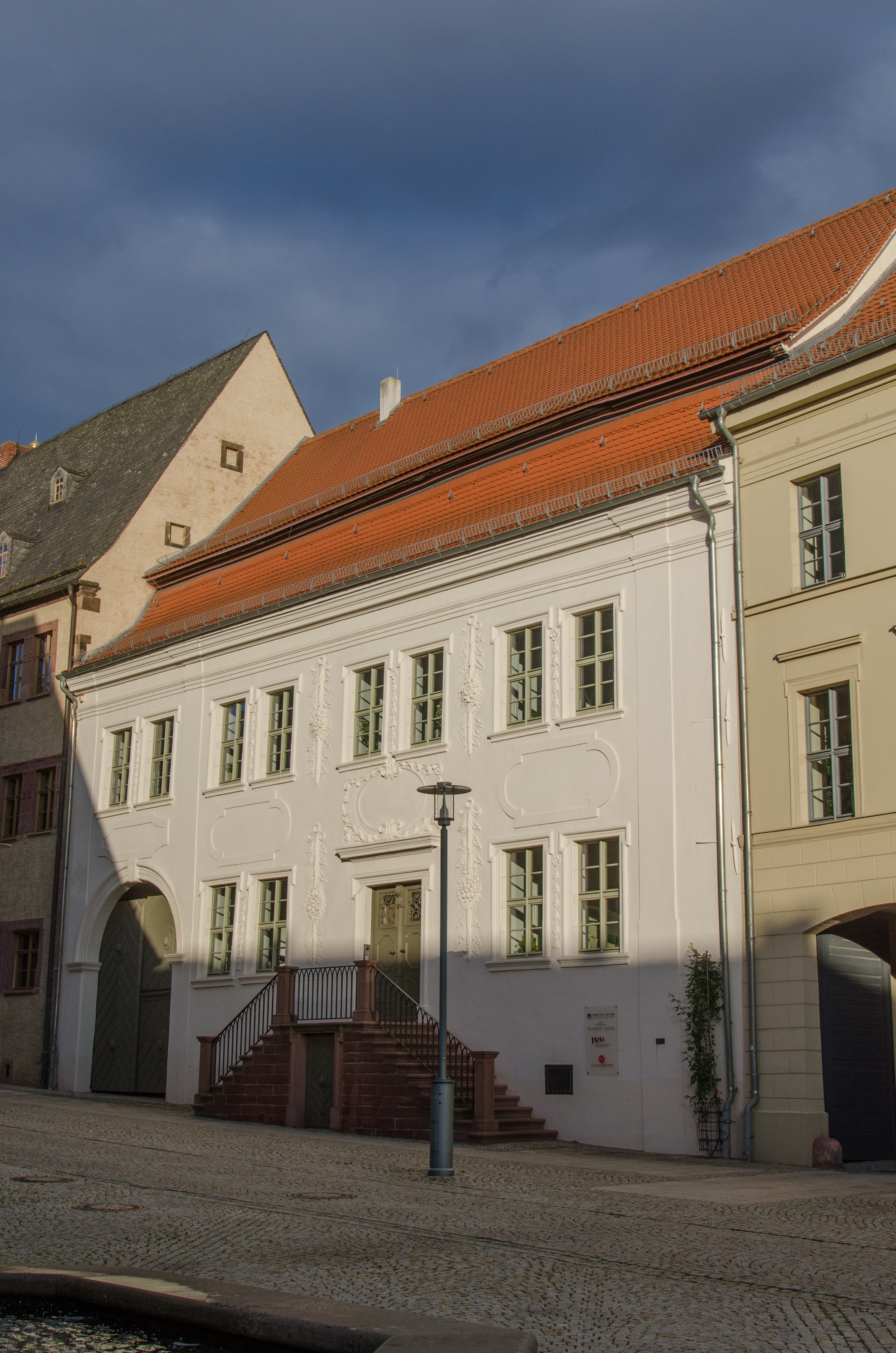 Sangerhausen, Markt 5